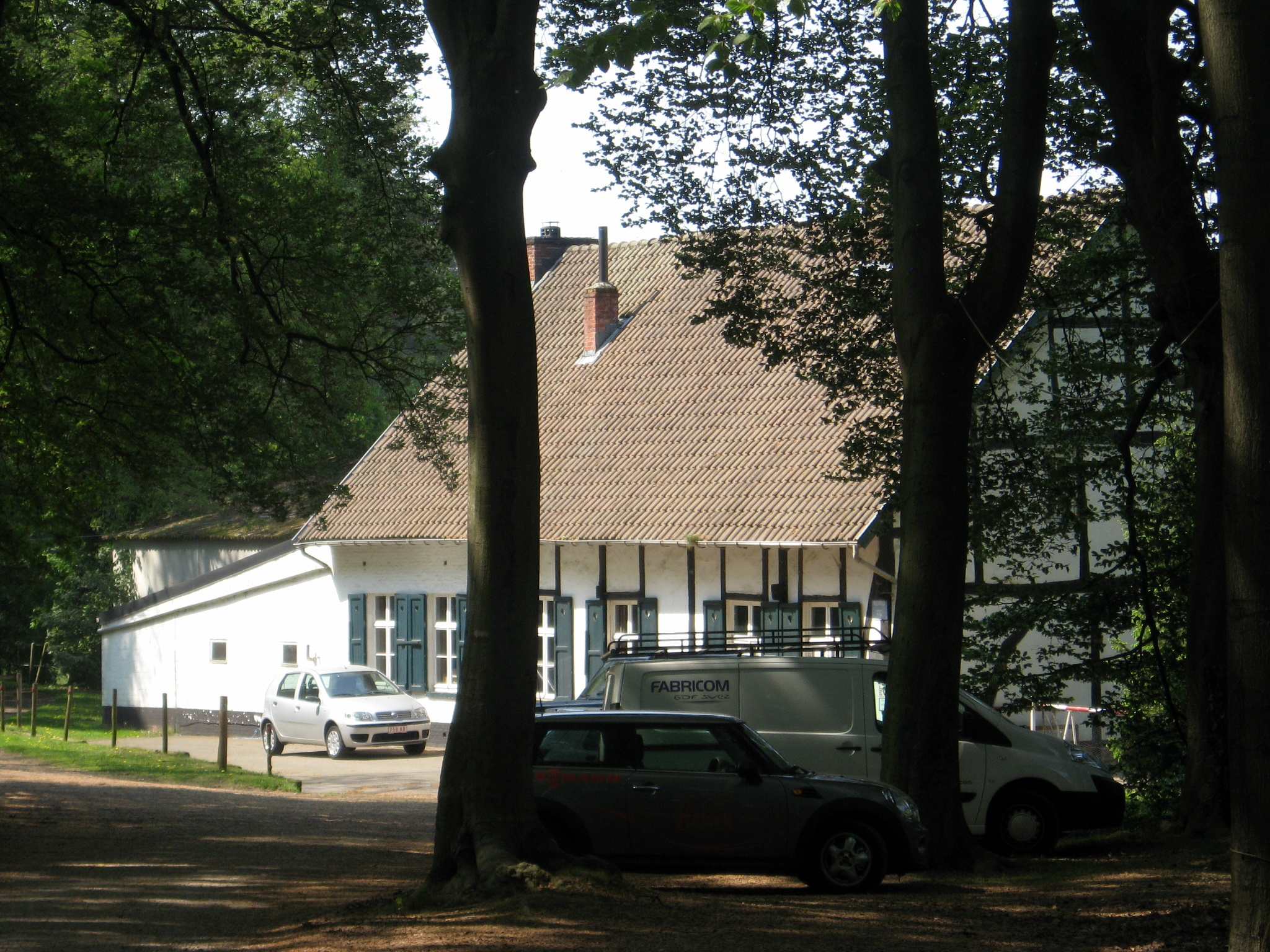 Voormalige watermolen, nu manege, in Zolder